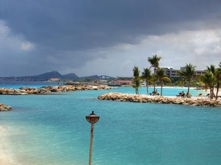 Bild tagen från Seaquarium mot Willemstad på Curacao